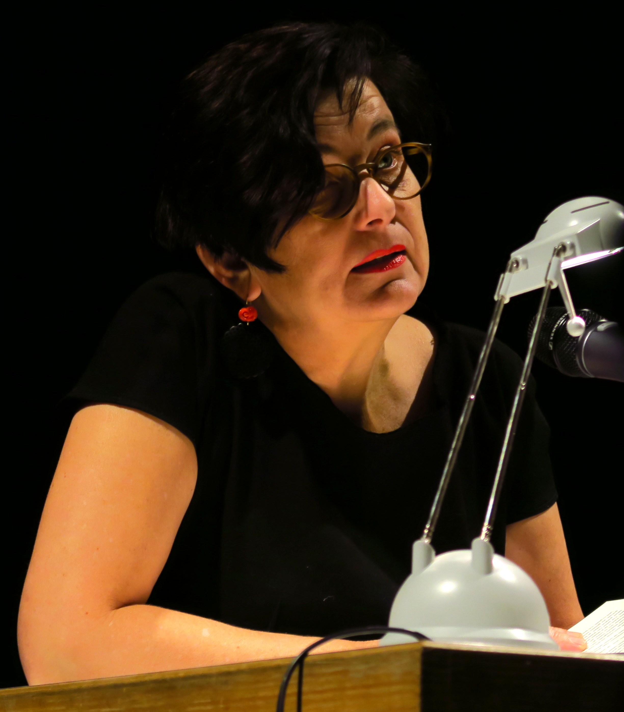 Die deutsche Schriftstellerin Andrea Maria Schenkel bei der Premierenlesung ihres im März 2016 erschienen Werkes Als die Liebe endlich war in der Seidlvilla in München-Schwabing